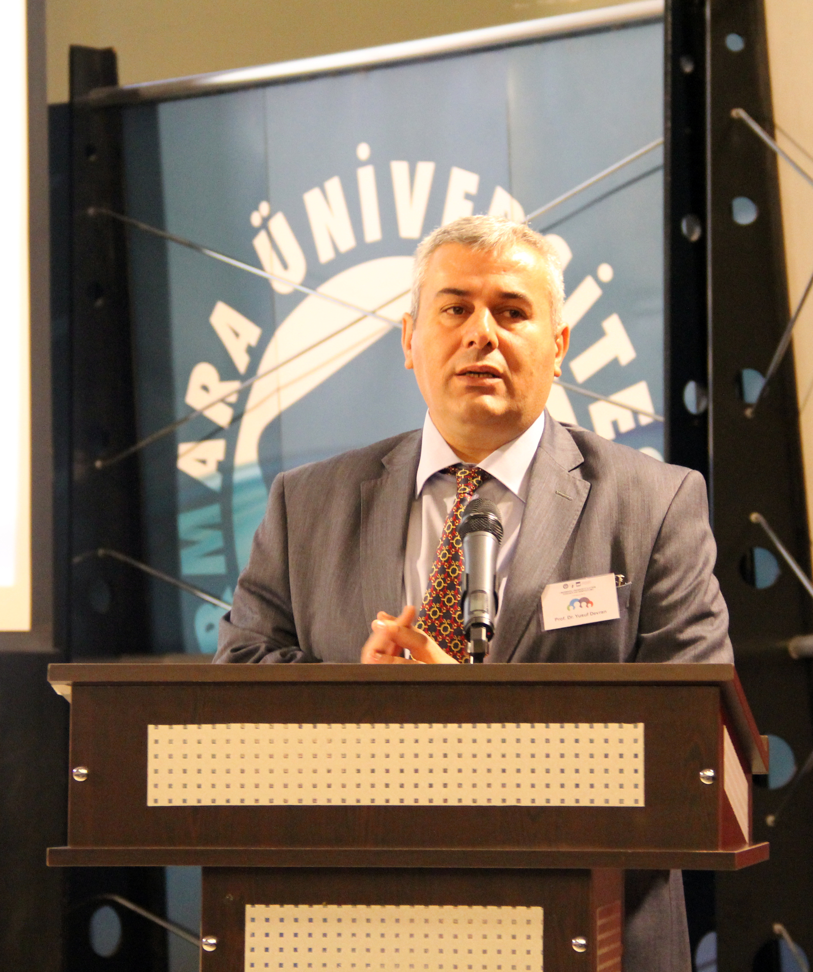 Marmara Üniversitesi Dekanı Prof. Dr. Yusuf Devran